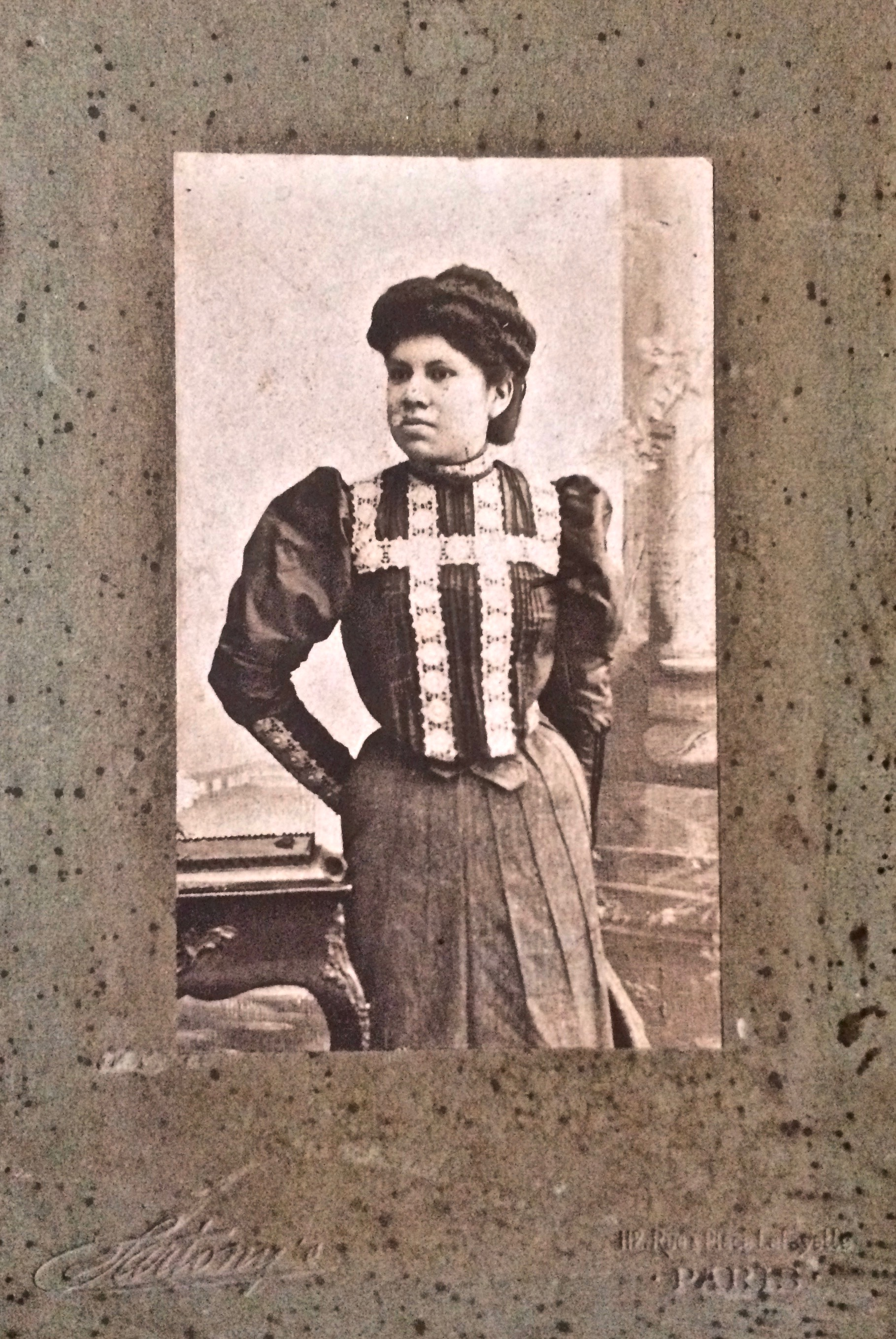 María de la Luz Pérez en su estadía por Francia. Fotografía cortesía de su nieto: Tomás Inocencio Pérez Víquez